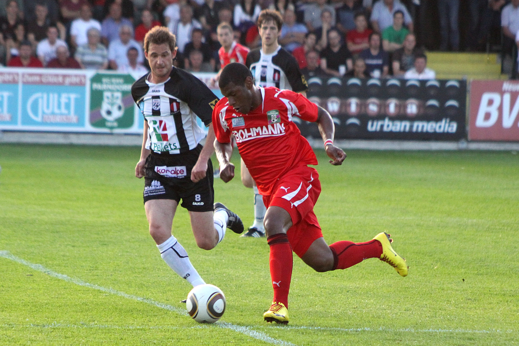 Relegationsspiel um den Aufstieg in die Erste Liga: SC-ESV Parndorf 1919 (rote Trikots) gegen Wolfsberger AC/SK St. Andrä 1:0 (1:0) → Für die Spielernamen bitte mit der Maus über das Bild fahren